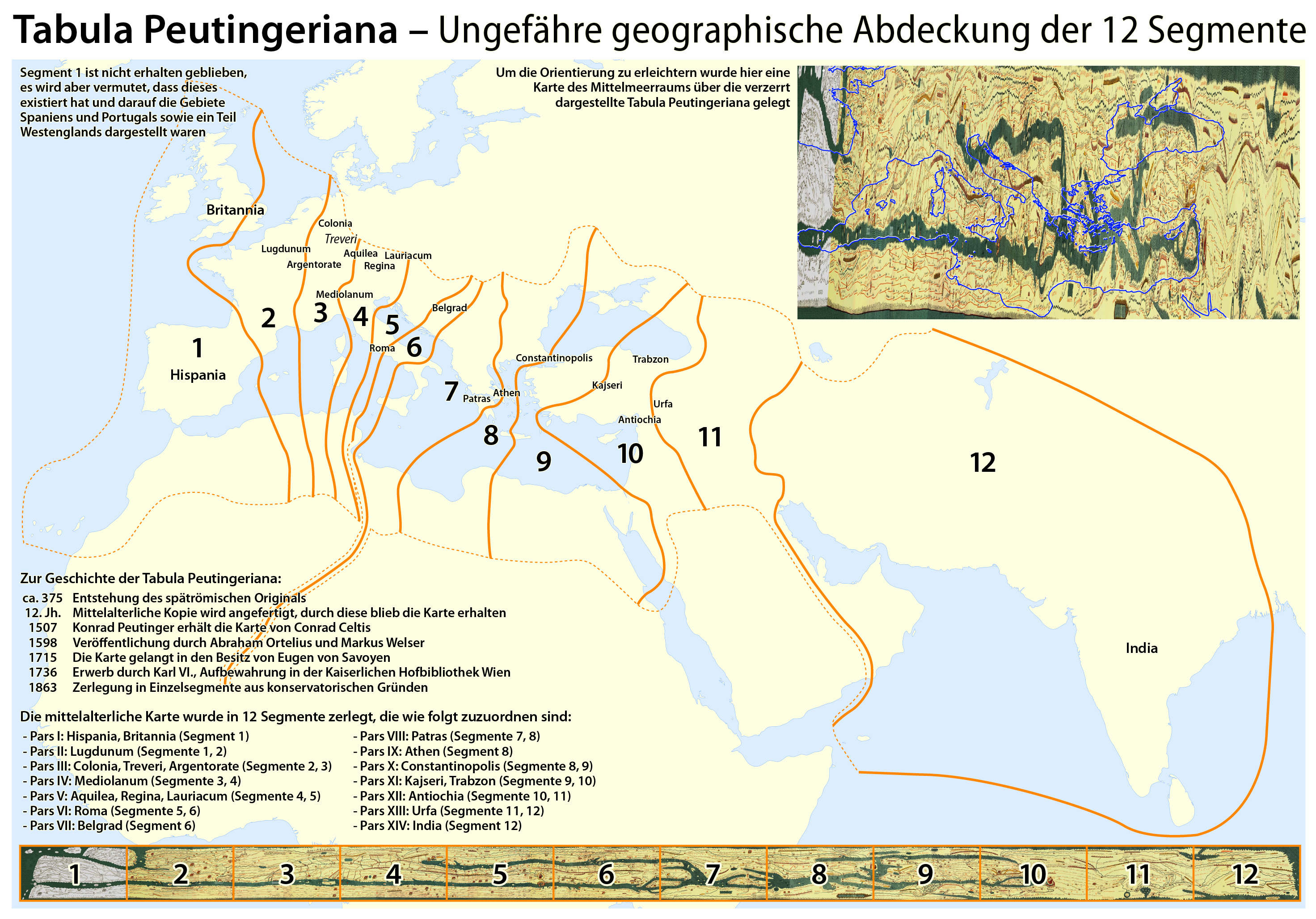 Tabula Peutingeriana: Ungefähre geographische Abdeckung der 12 Segmente